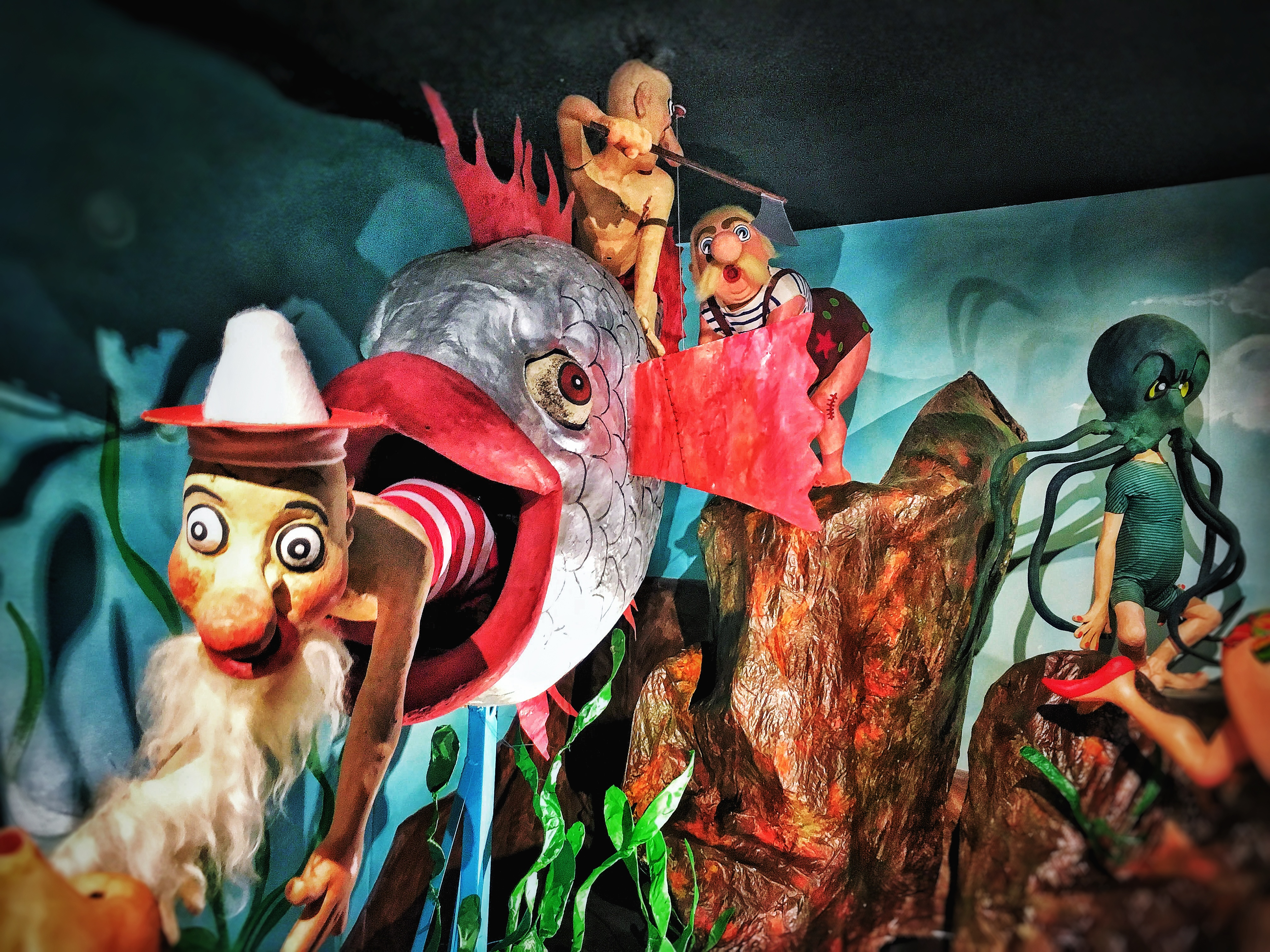 Pêche sous marine dessiné par Albert Dubout